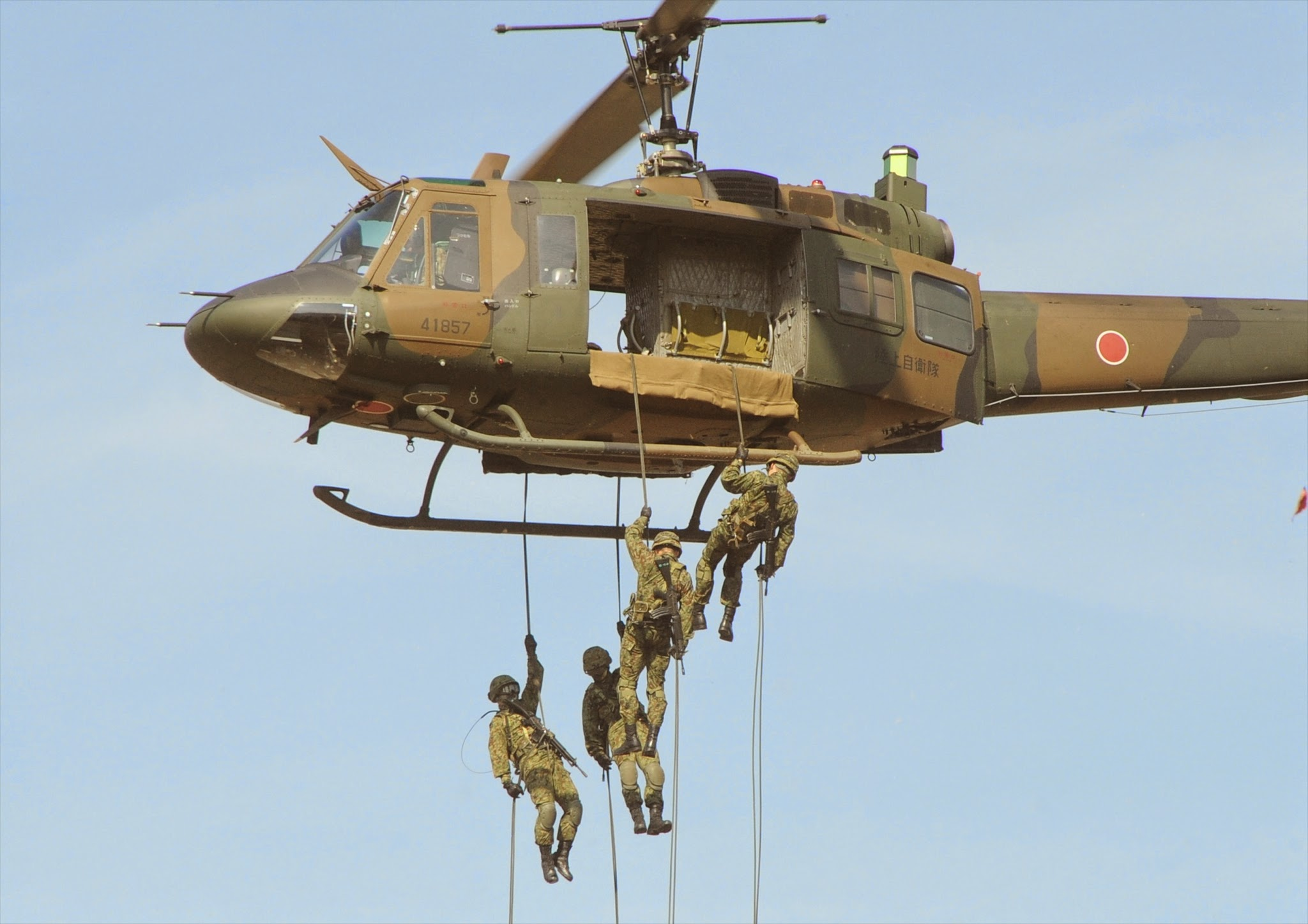 ＵＨ－１Ｊ（別府駐屯地創立記念行事訓練展示・第４１普通科連隊）